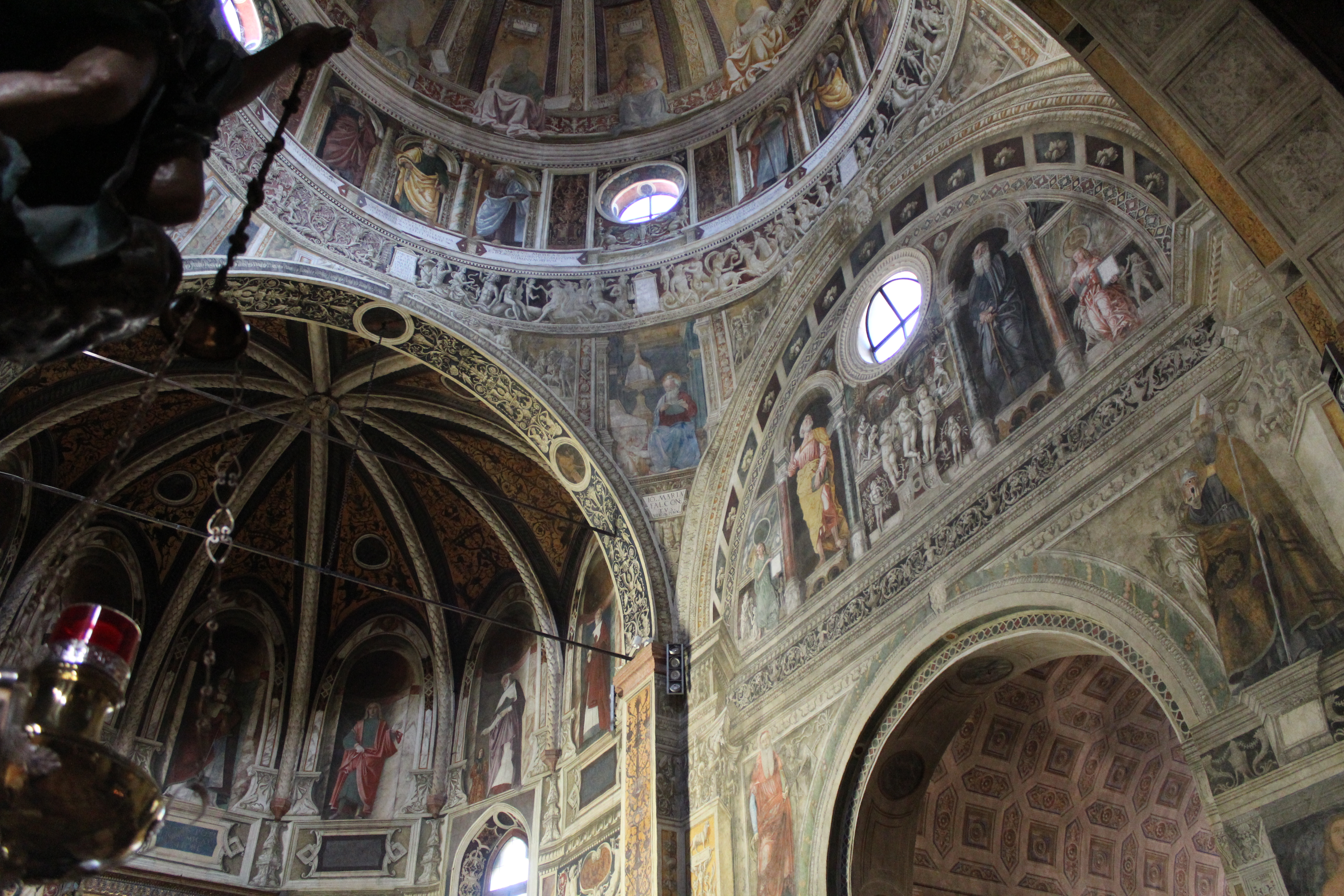 Cappella di San Biagio posta all'interno (braccio sinistro del transetto) della chiesa dei Santi Nazaro e Celso di Verona